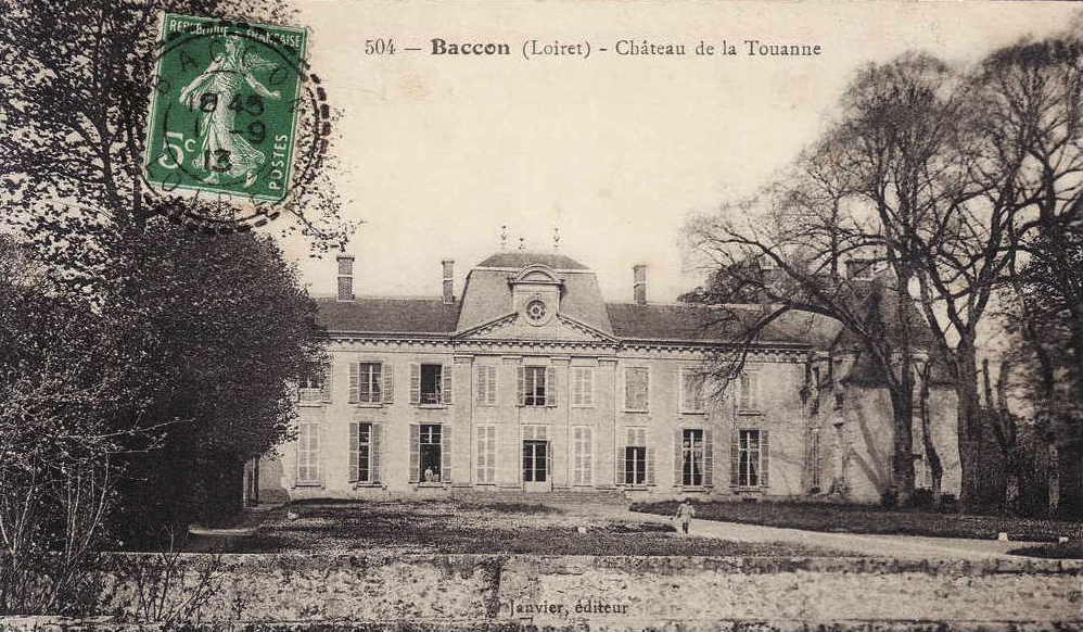 Carte postale ancienne. Château de la Touanne, Baccon, Loiret, Centre, France